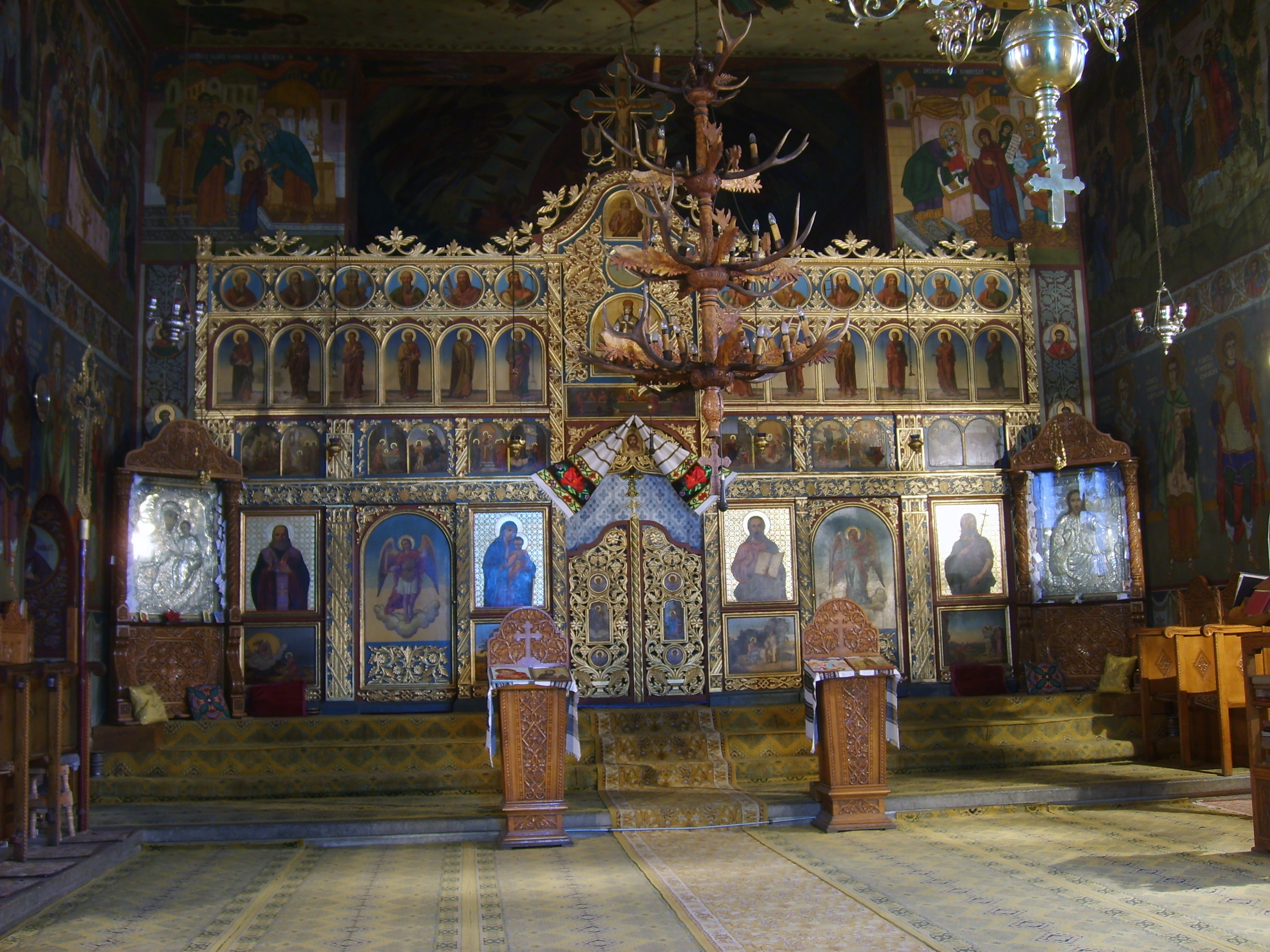 An orthodox church in Gura Humorului